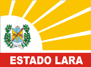 Primera bandera de l'estat de Lara (VENEÇUELA)